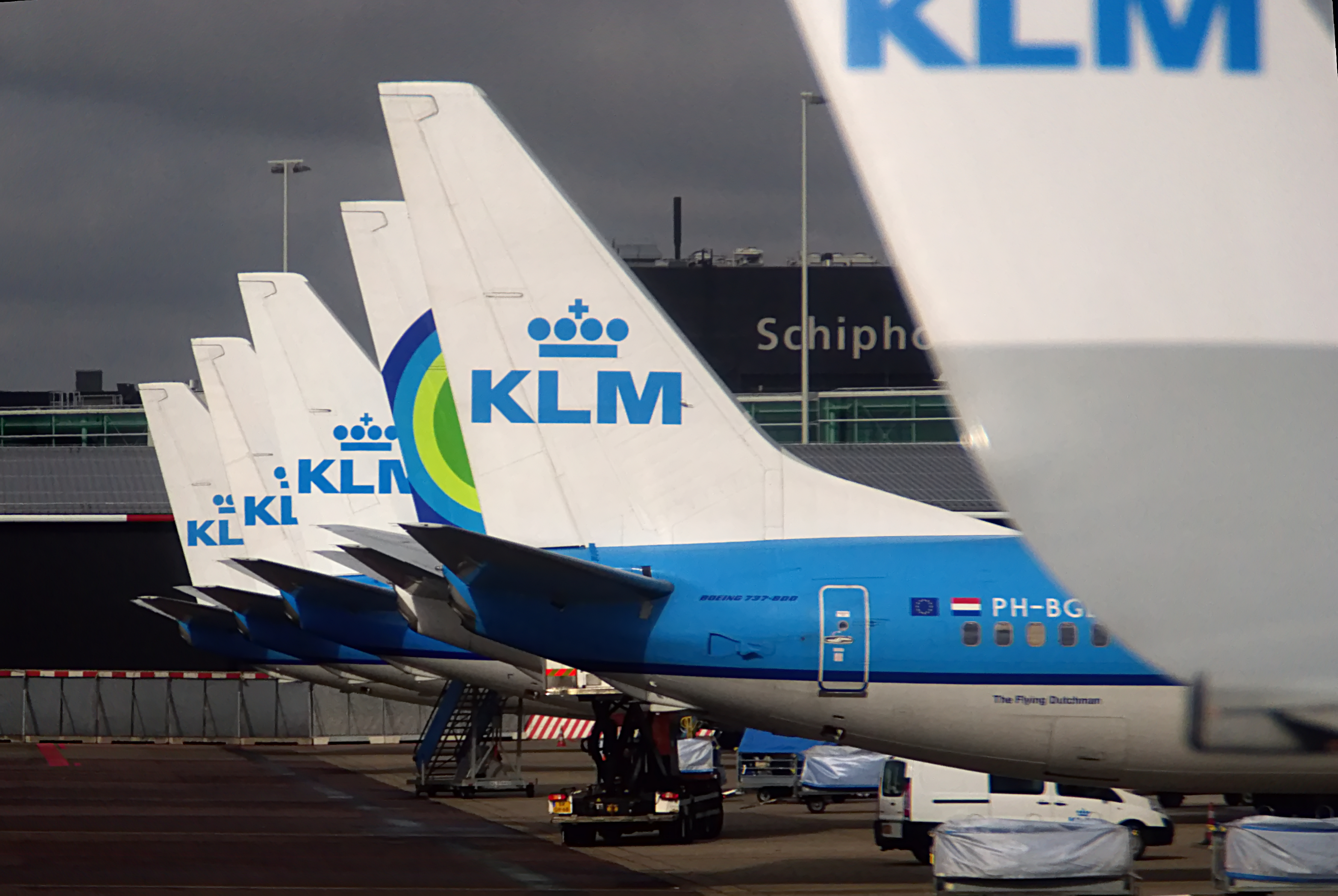 Avions KLM et Transavia à l'aéroport Schipjol d'Amsterdam